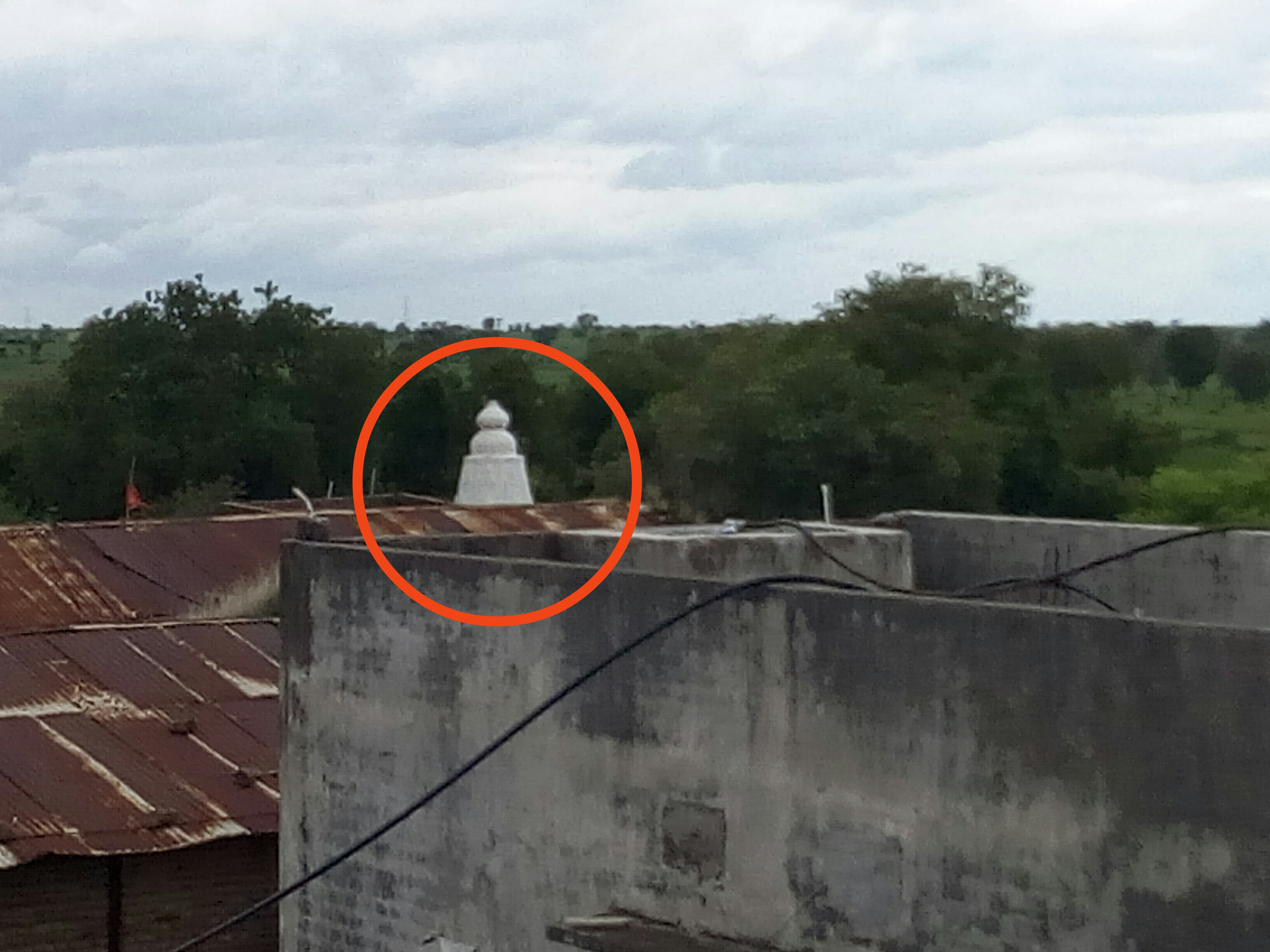 श्री हनुमान मंदिर शिखर